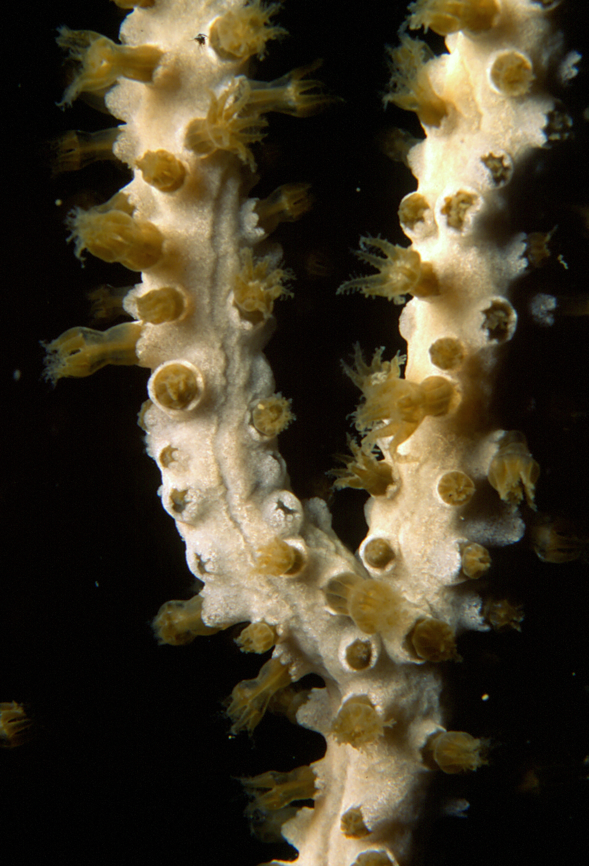 Eunicella singularis (Esper, 1794) - Banyuls-sur-Mer : 07/92